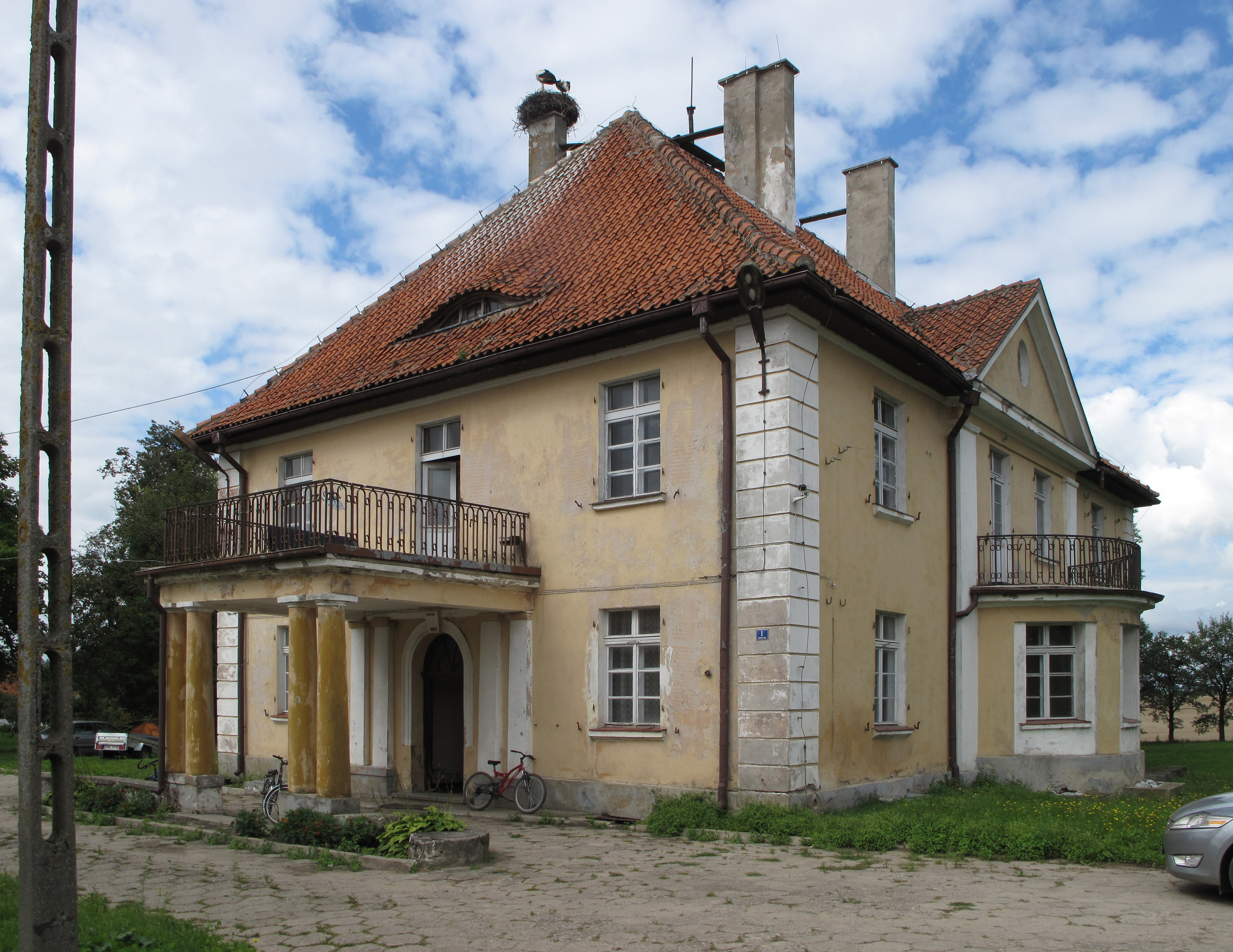 Zespół pałacowy z XIX/XX w. w Dąbrówce Małej (gmina Węgorzewo).